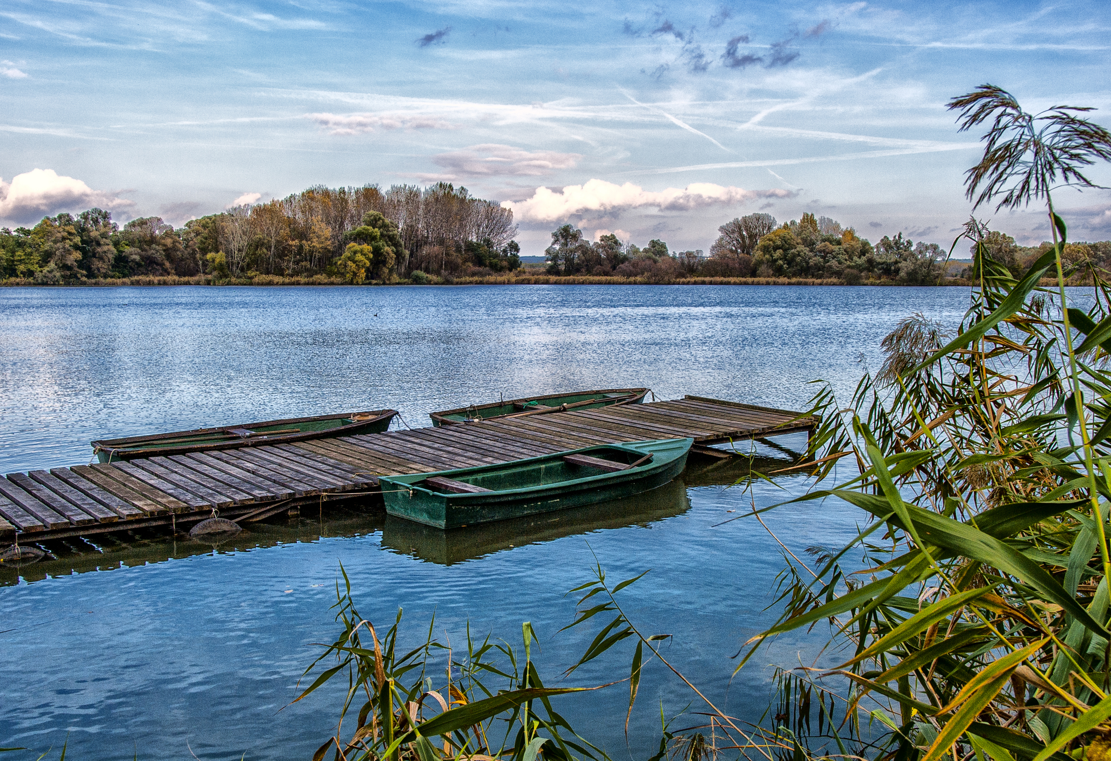 Naplás tó